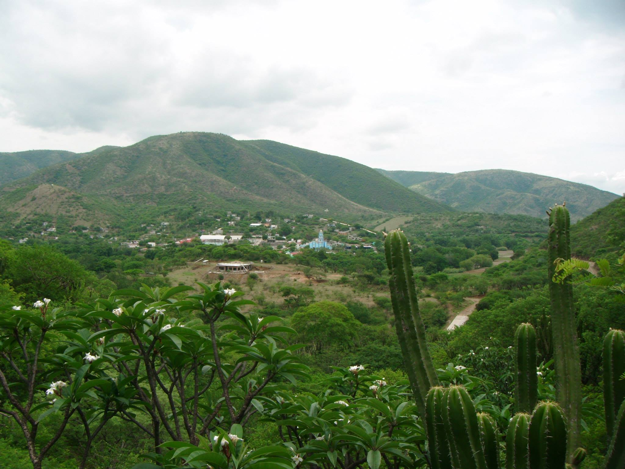 Vista Panorámica del centro de Xayacatlan de Bravo